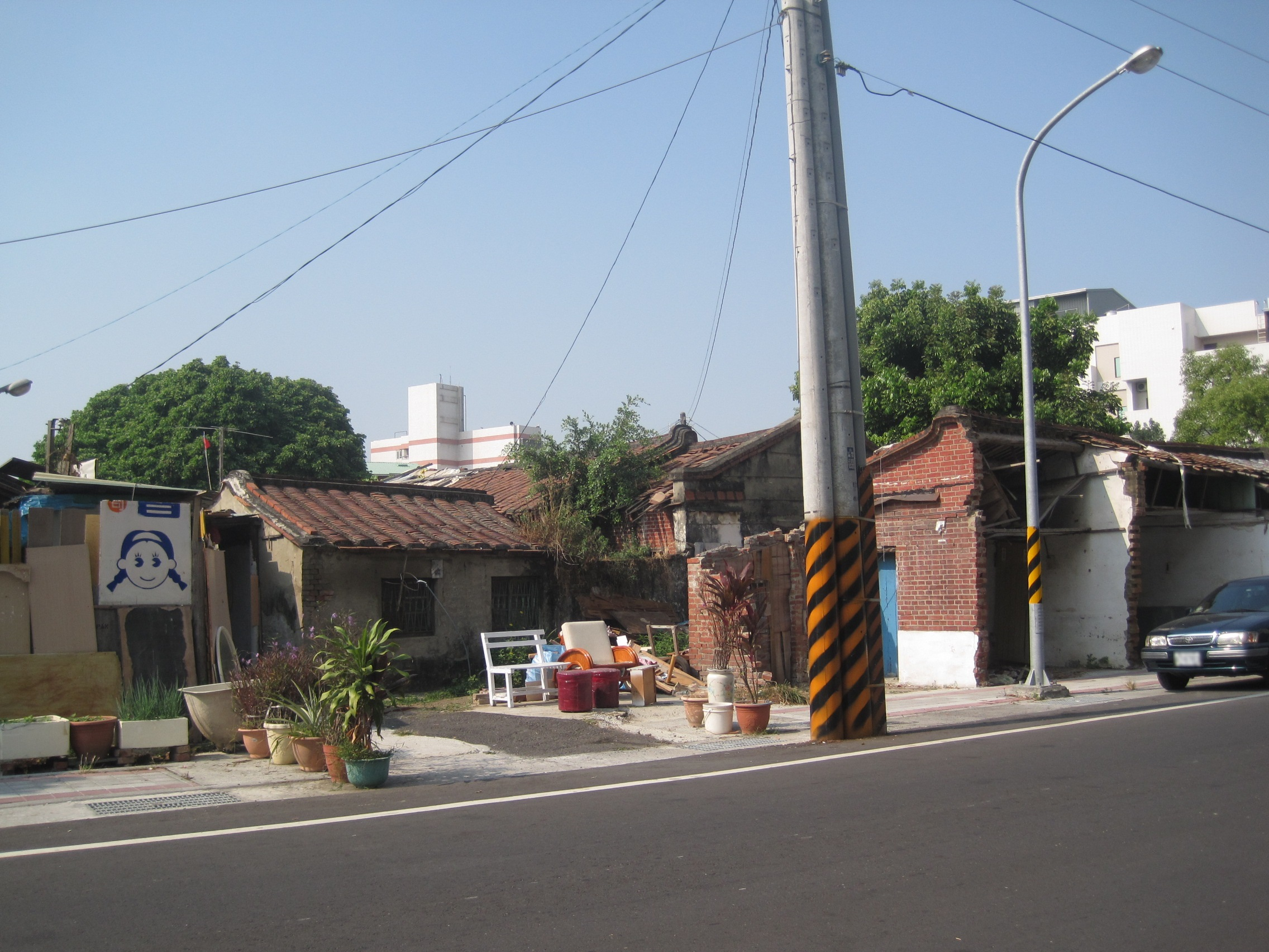 臺南德高厝老屋